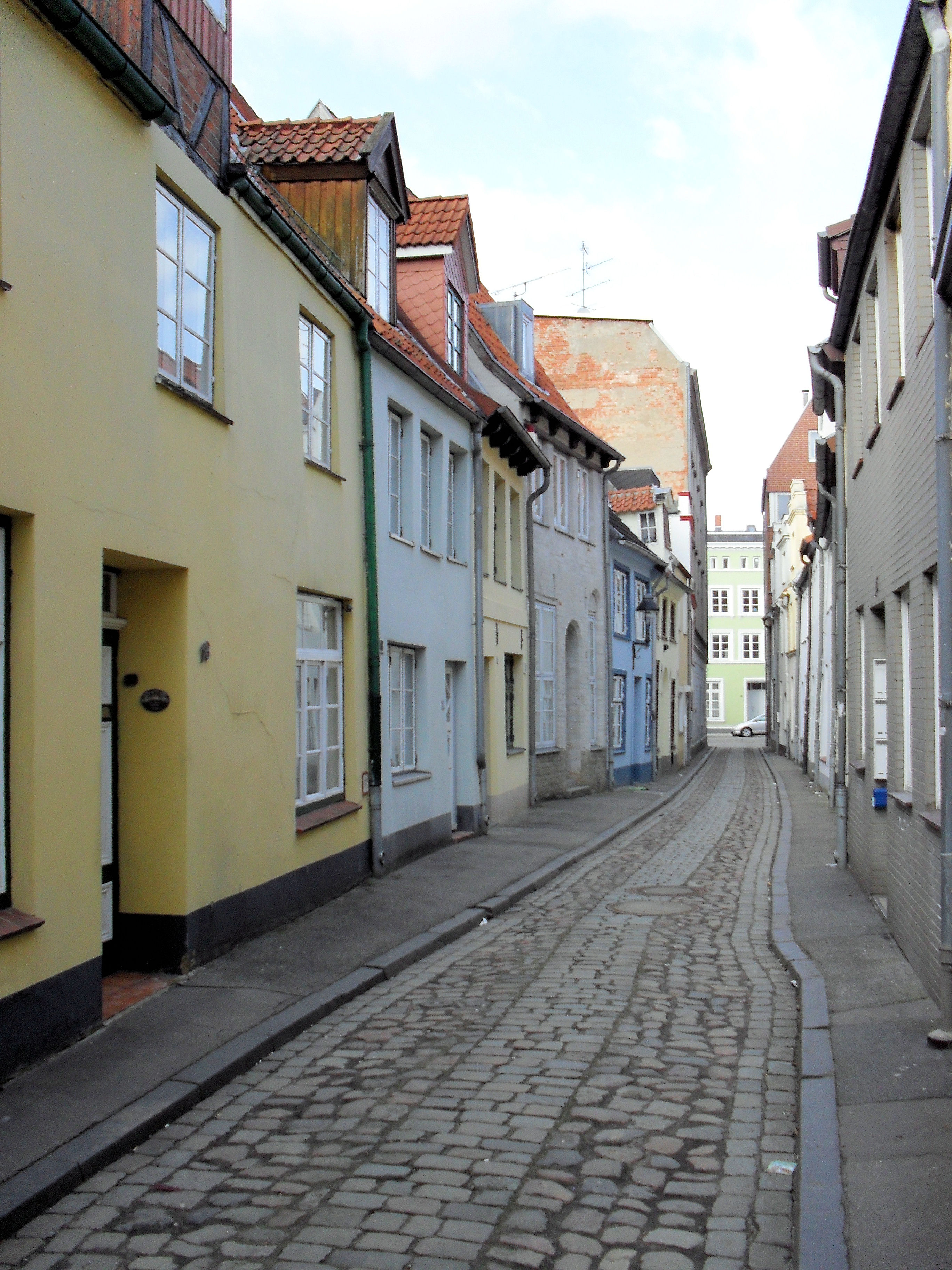 Die Düstere Querstraße in Lübeck